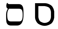 hebrew letter samekh